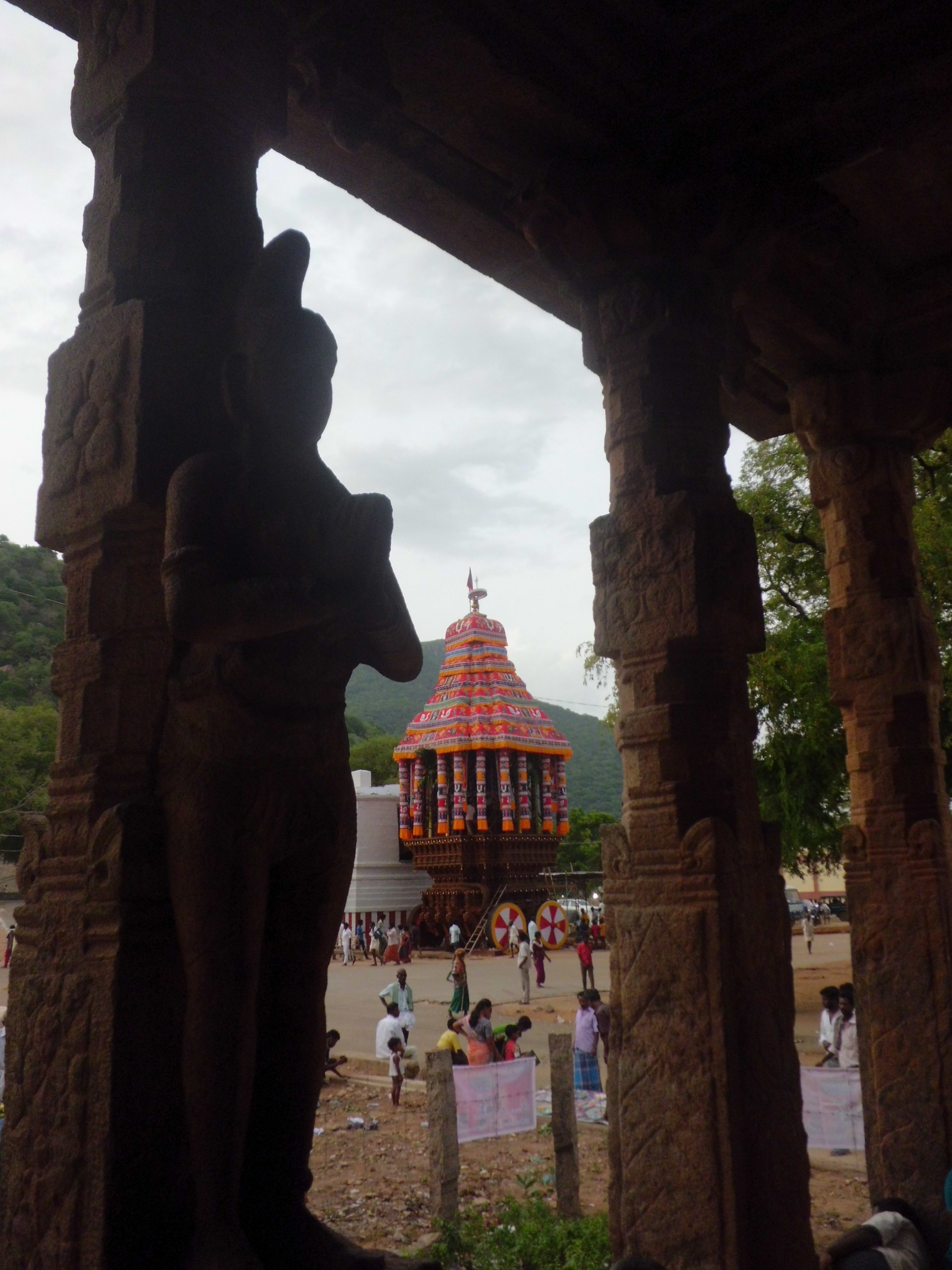 மதுரை அழகர்கோயிலின் புதிய தேர்